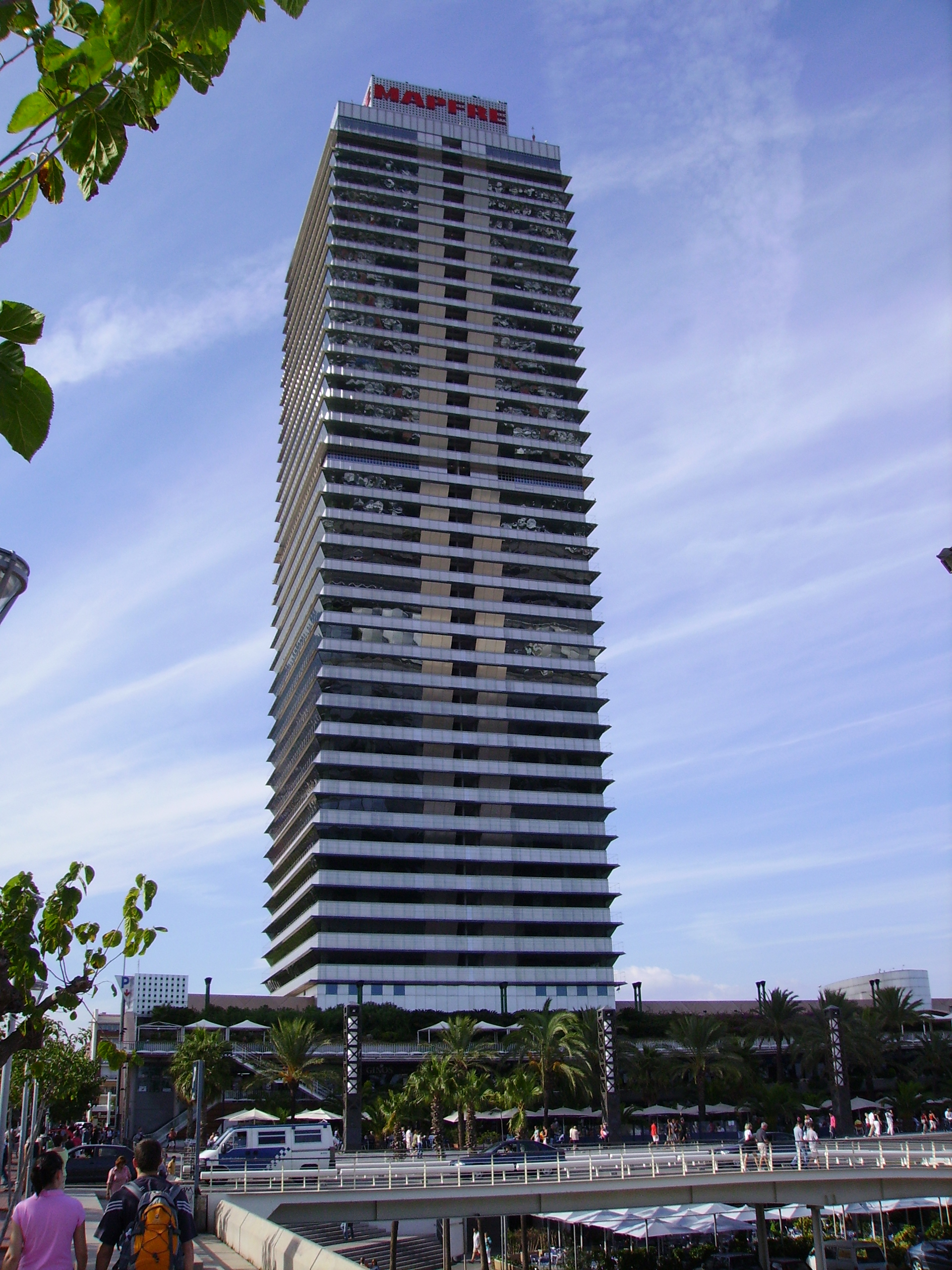 Torre Mapfre, Barcelona, catalunya.